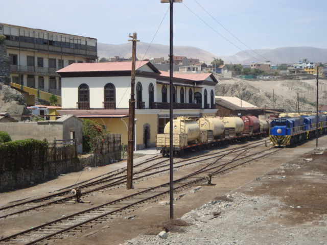 Estacion de Ferrocarril de Mollendo (Tambien Estacion Cultural y Museo)